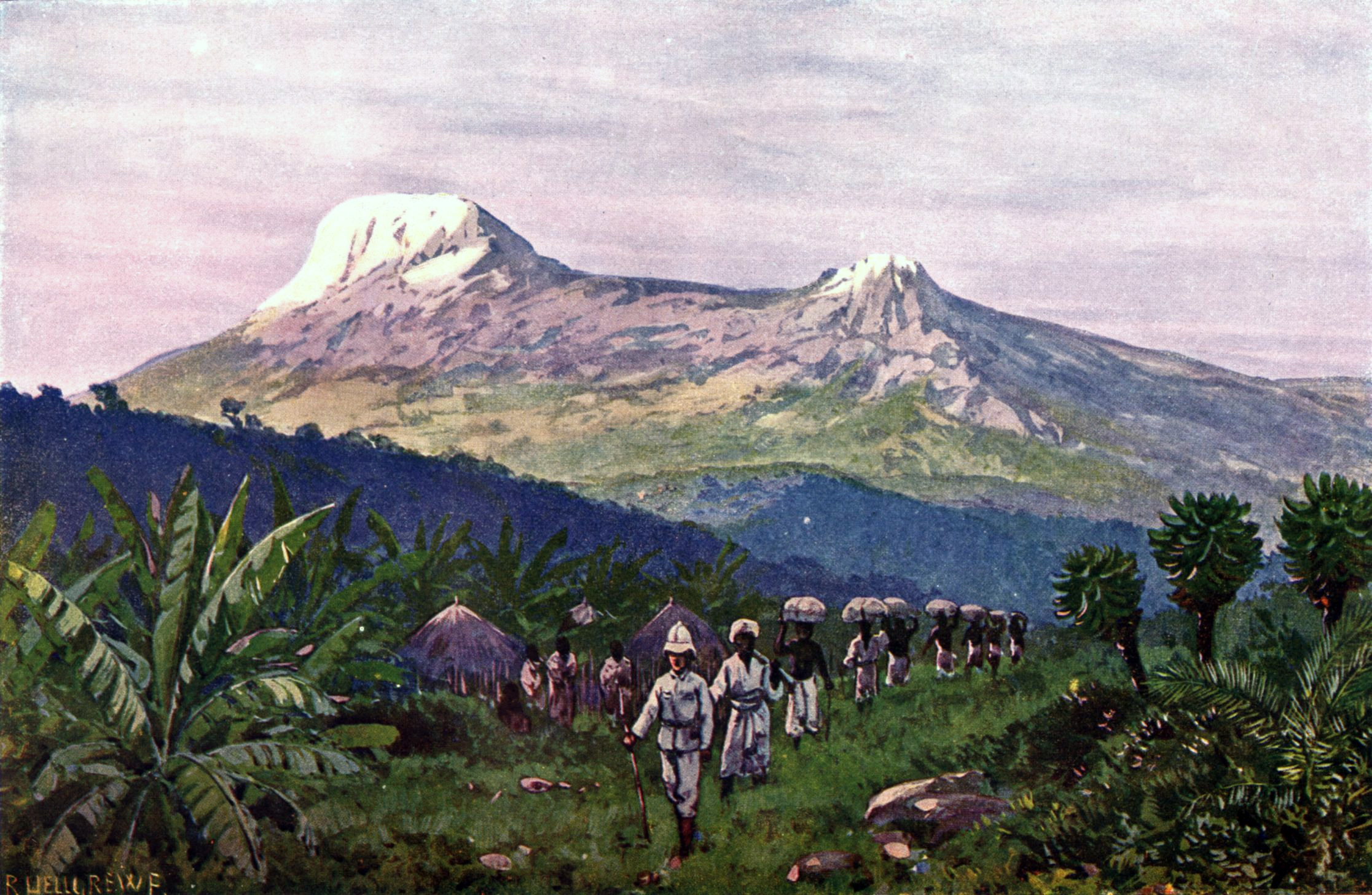 Landschafts- und Kulturbild, im Vordergrunde Negerhütten* und Trägerkarawane der deutschen Schutztruppe. (*Originalbeschreibung von 1911)